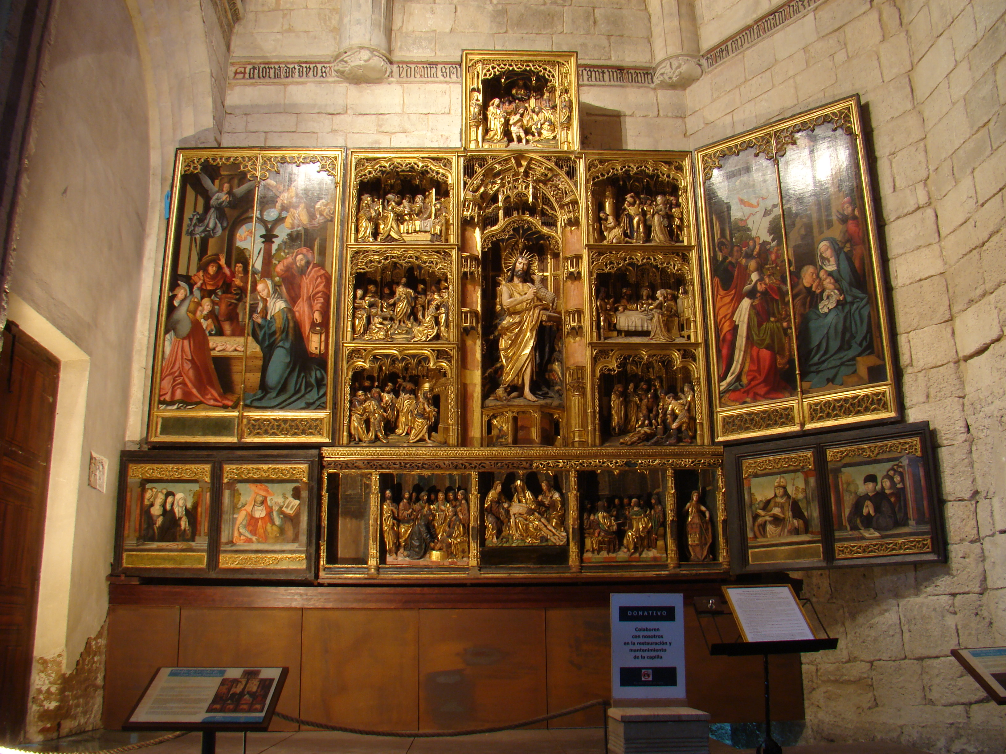 Capilla de San Juan Bautista en la iglesia del Salvador en Valladolid, España. Retablo-tríptico importado de Flandes en 1502, con pinturas en las portezuelas atribuidas al Maestro del Tríptico Morrison, seguidor de Quentin Metsys. Las esculturas son de los talleres de Amberes. El banco del tríptico está realizado en España hacia 1500 por un escultor burgalés del círculo de Felipe Vigarny.